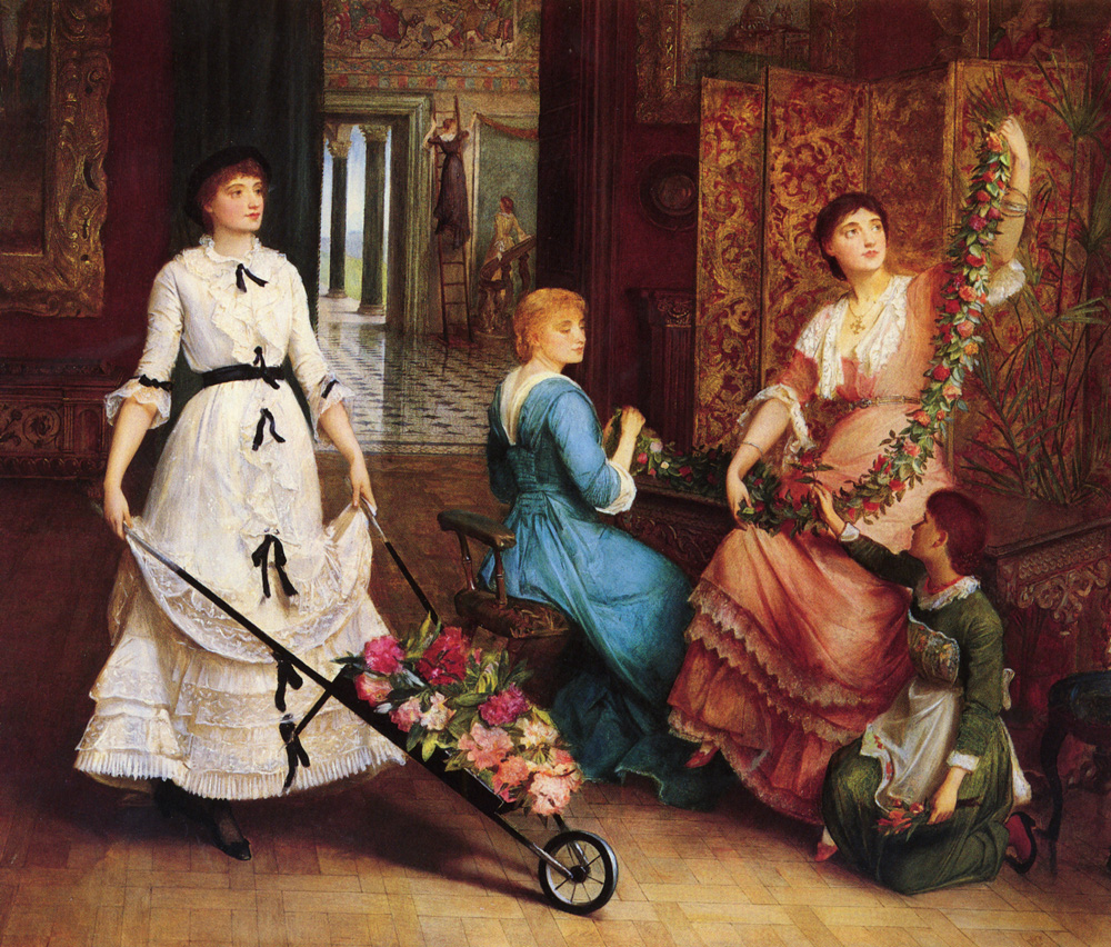 Preparing for the Ball